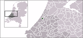 Locatie gemeente Valkenburg. Afbeelding gemaakt door gebruiker:Mtcv en vrij te gebruiken.